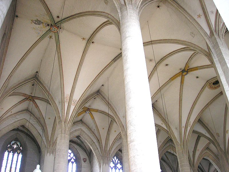 Dom zu Eichstätt (Oberbayern). Blick ins Gewölbe des Langhauses. Eigene Aufnahme, April 2007 / Eichstaett cathedral (Upper Bavaria, Germany). The nave. Looking up to the vault. Own photo, April 2007